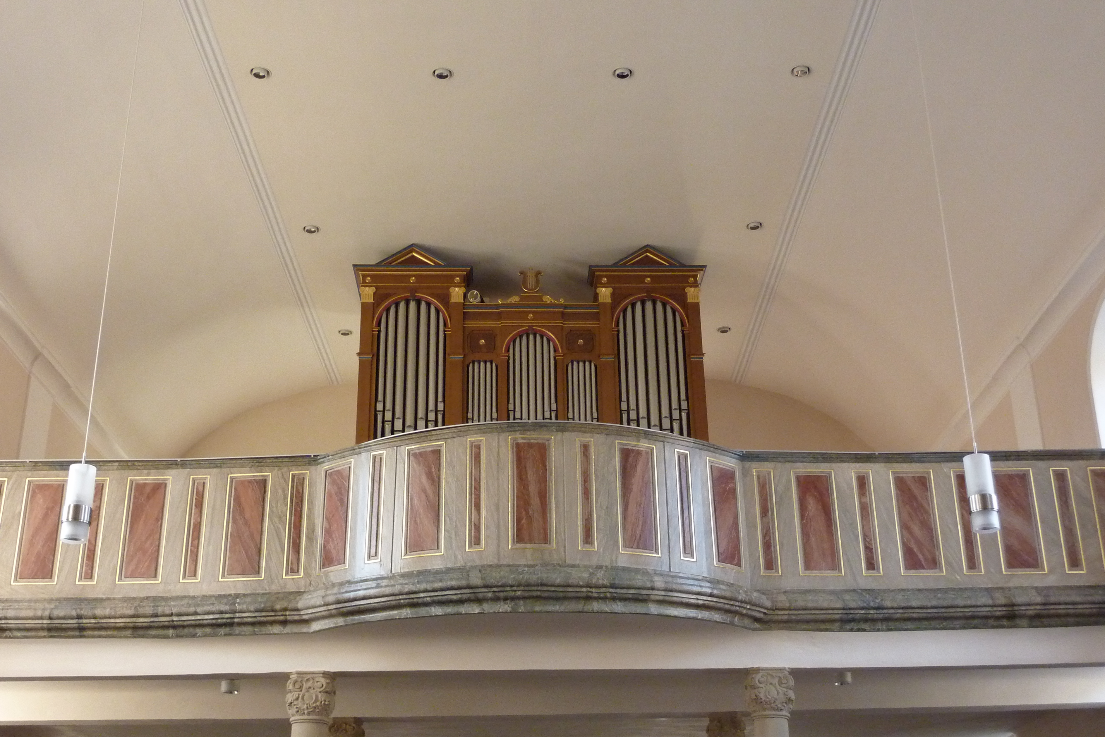 St. Margaretha in Grombach